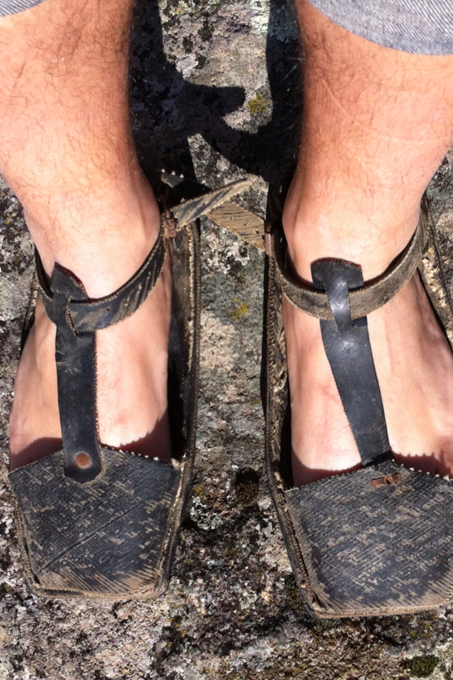 Albarcas fabricadas a partir de neumáticos usados.